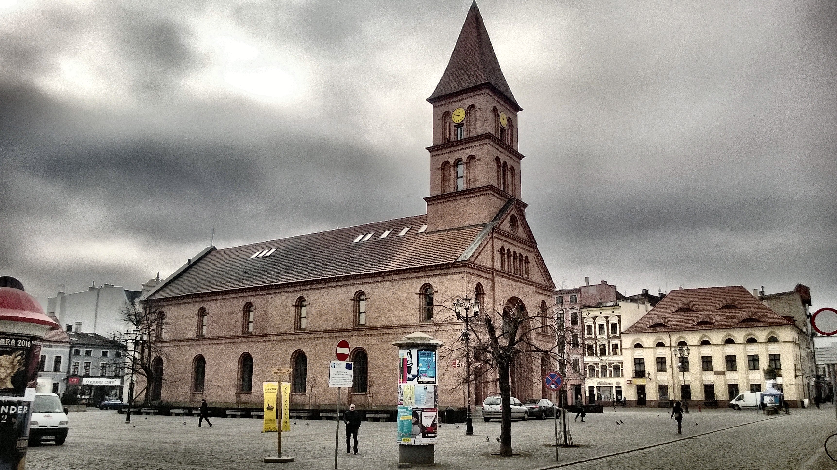 Toruń, Rynek Nowomiejski - dawny kościół ewangelicki pw. Świętej Trójcy, obecnie siedziba fundacji "Tumult", 1824